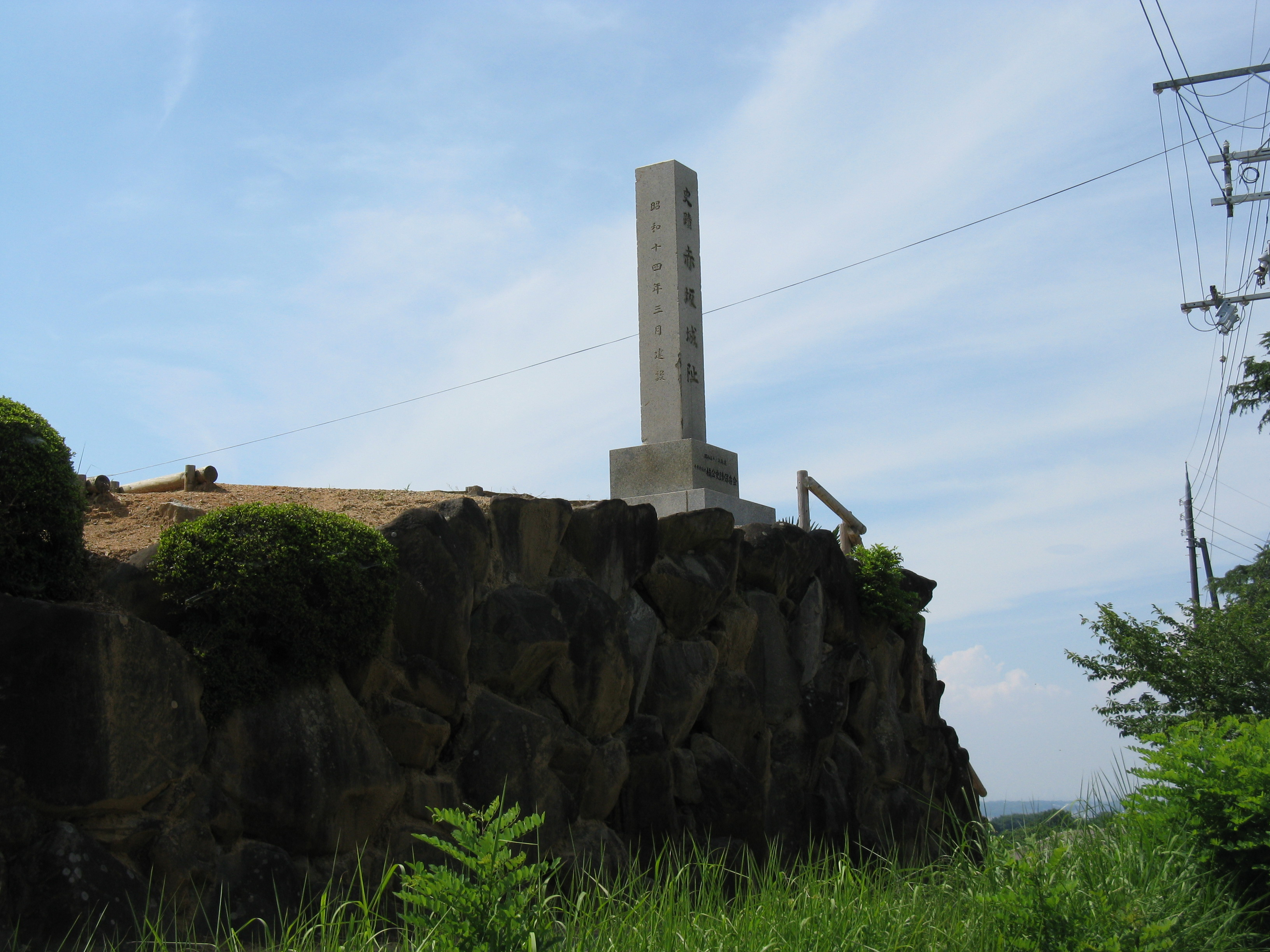 下赤坂城址